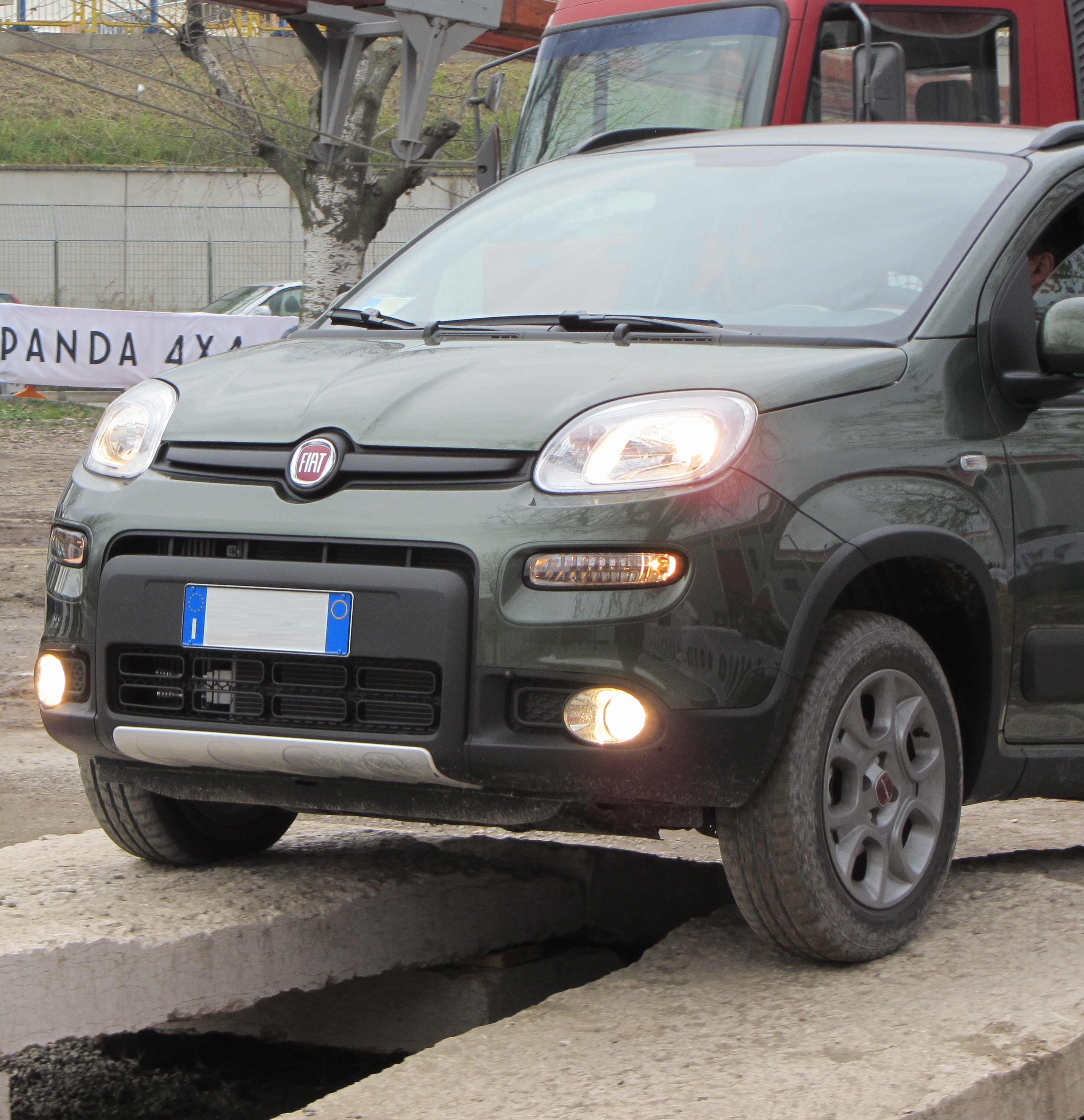 Una fiat Panda 4x4 durante un test fuoristrada, particolare delle luci anteriori